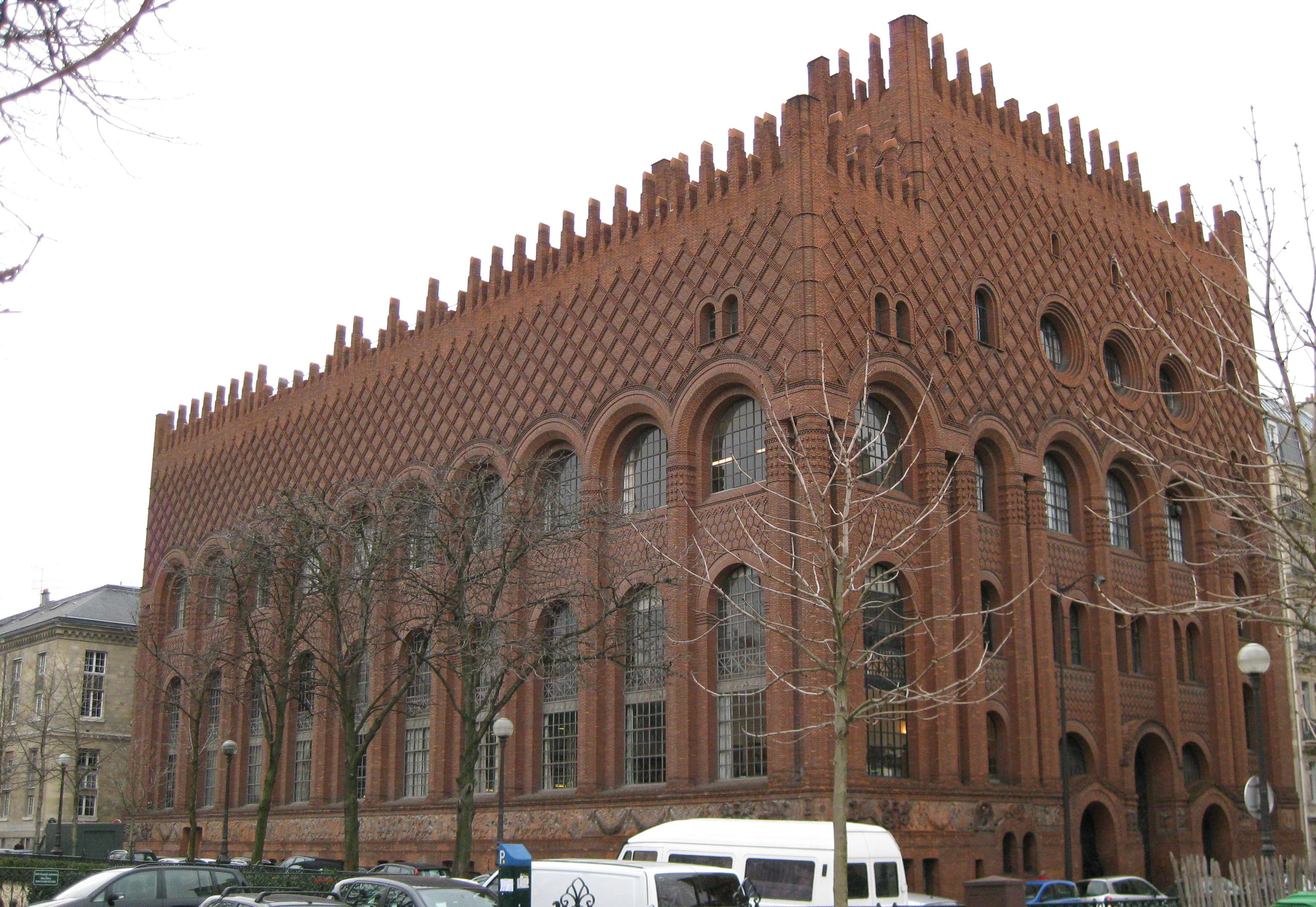 Institut d'art et d'archéologie, édifié par Paul Bigot à Paris. Universités Paris 1 et Paris 4.